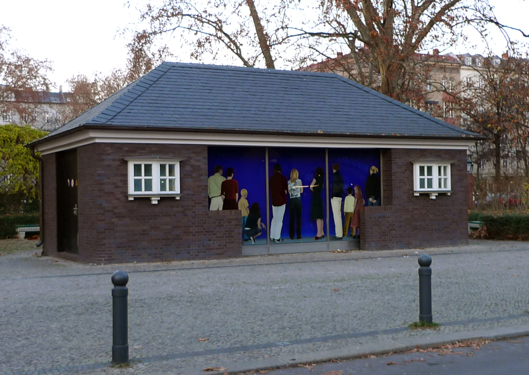 Das Stromhäuschen auf dem Savignyplatz in Berlin-Charlottenburg